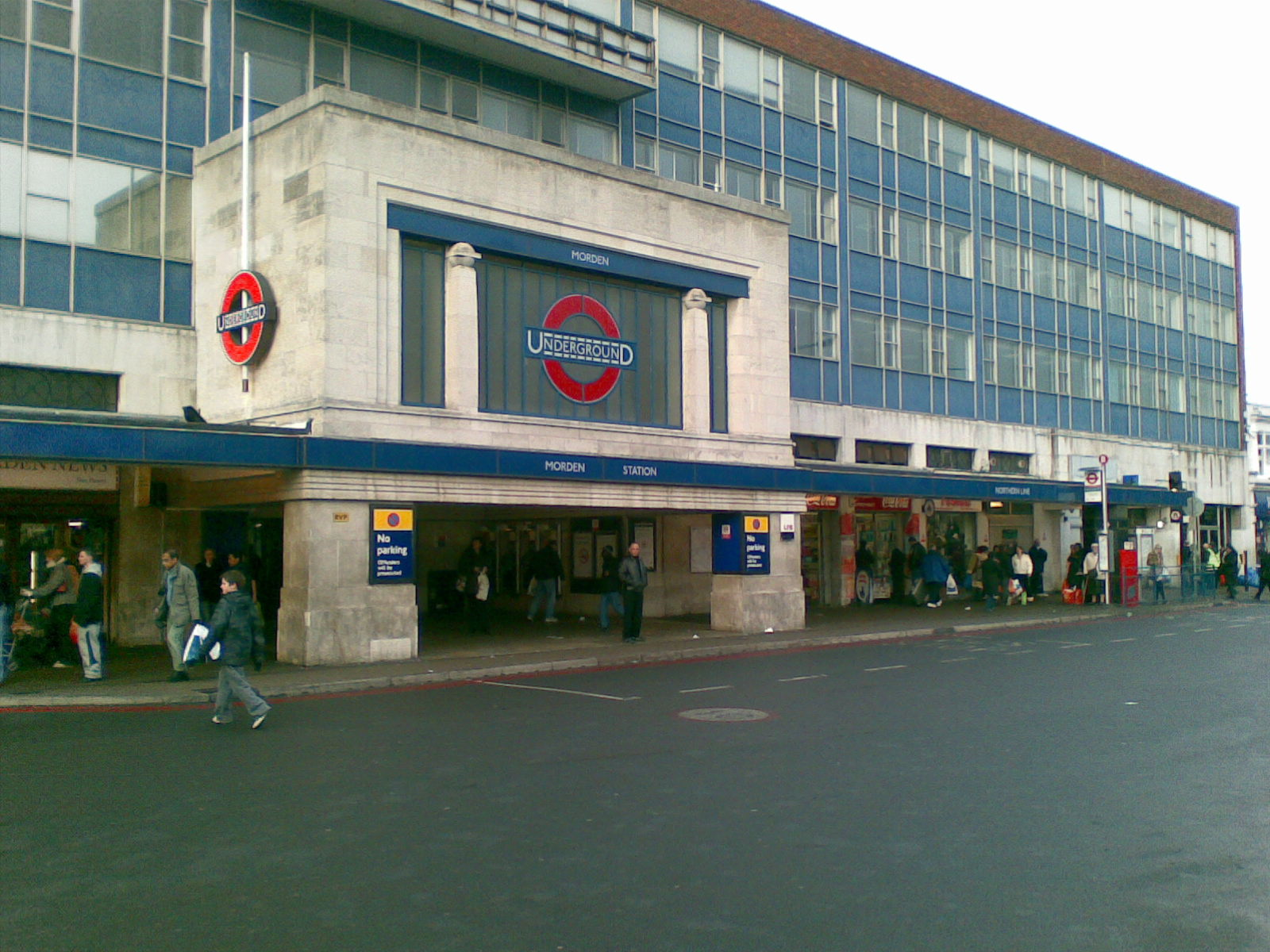 Morden Tube Station